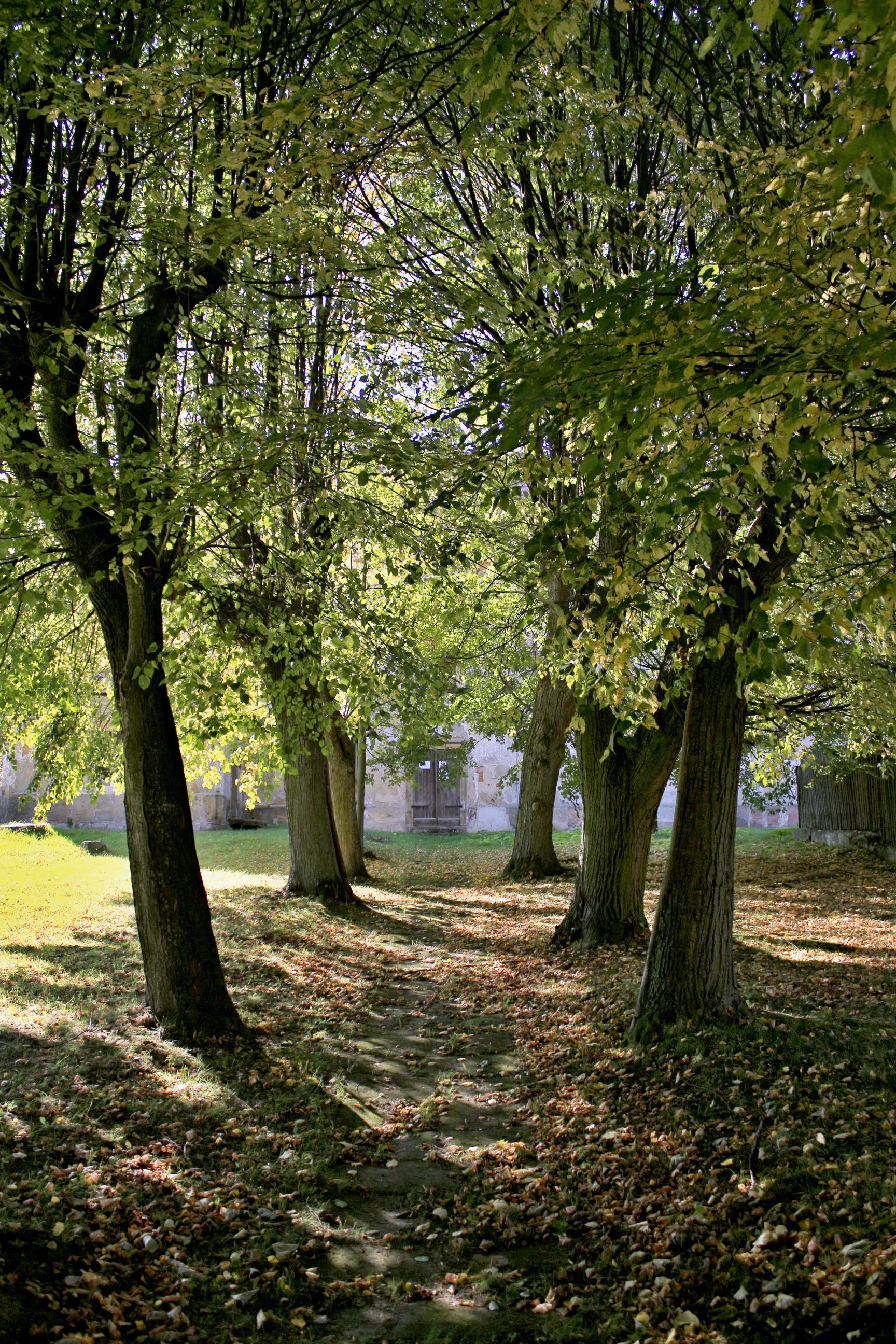 Rynoltice